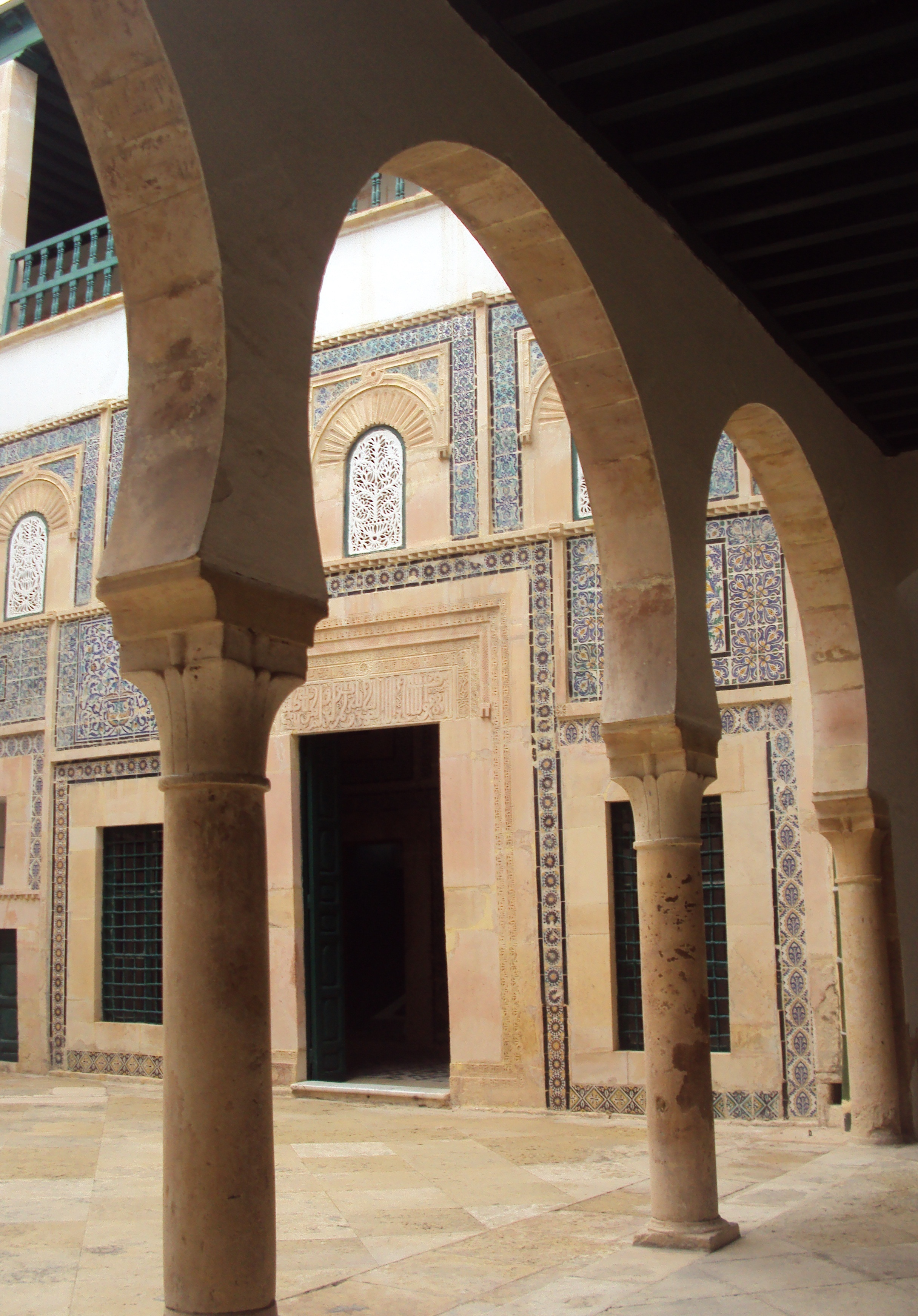 Ancienne Driba, Sfax